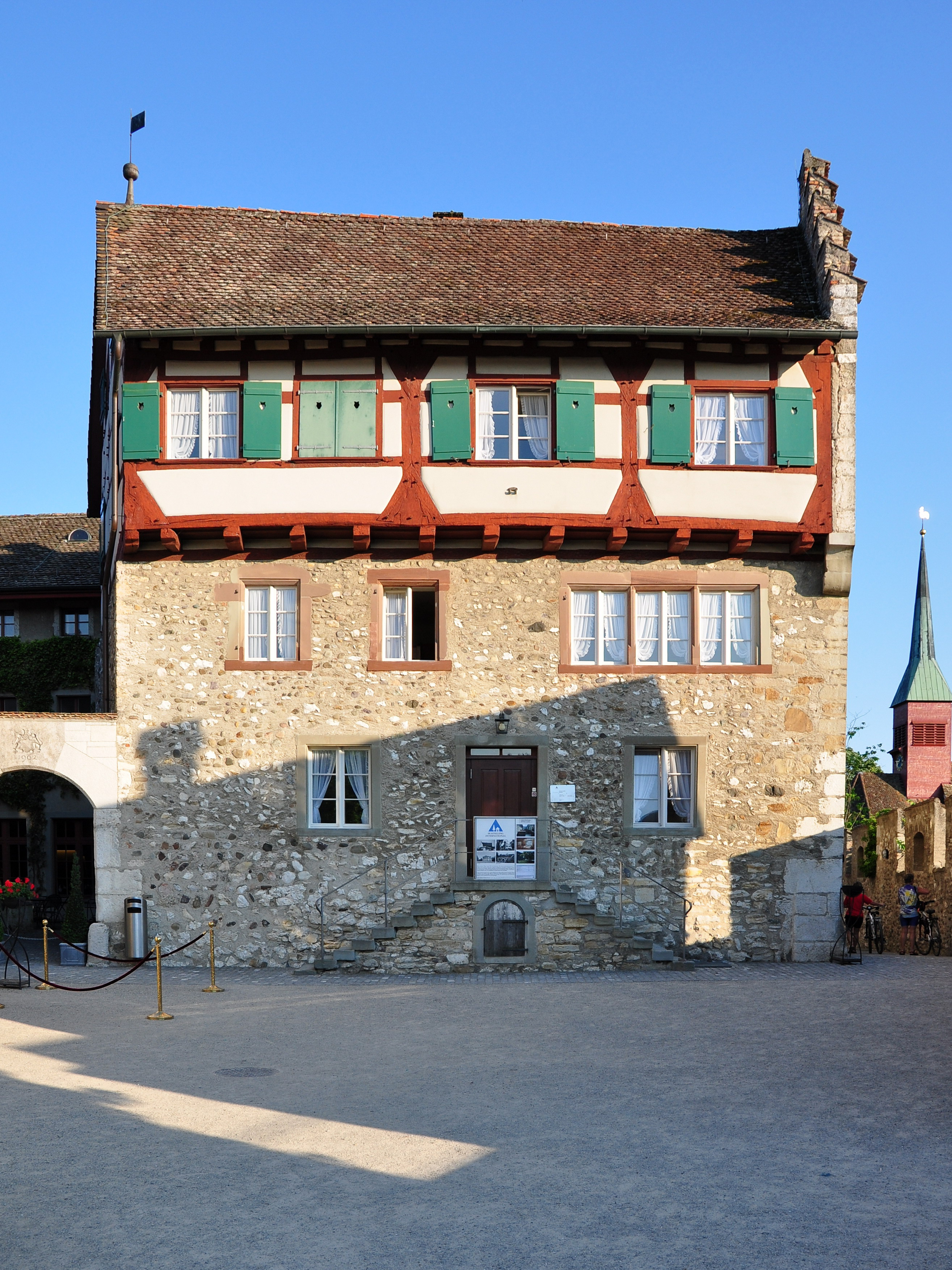 Schloss Laufen in Laufen-Uhwiesen (Switzerland)